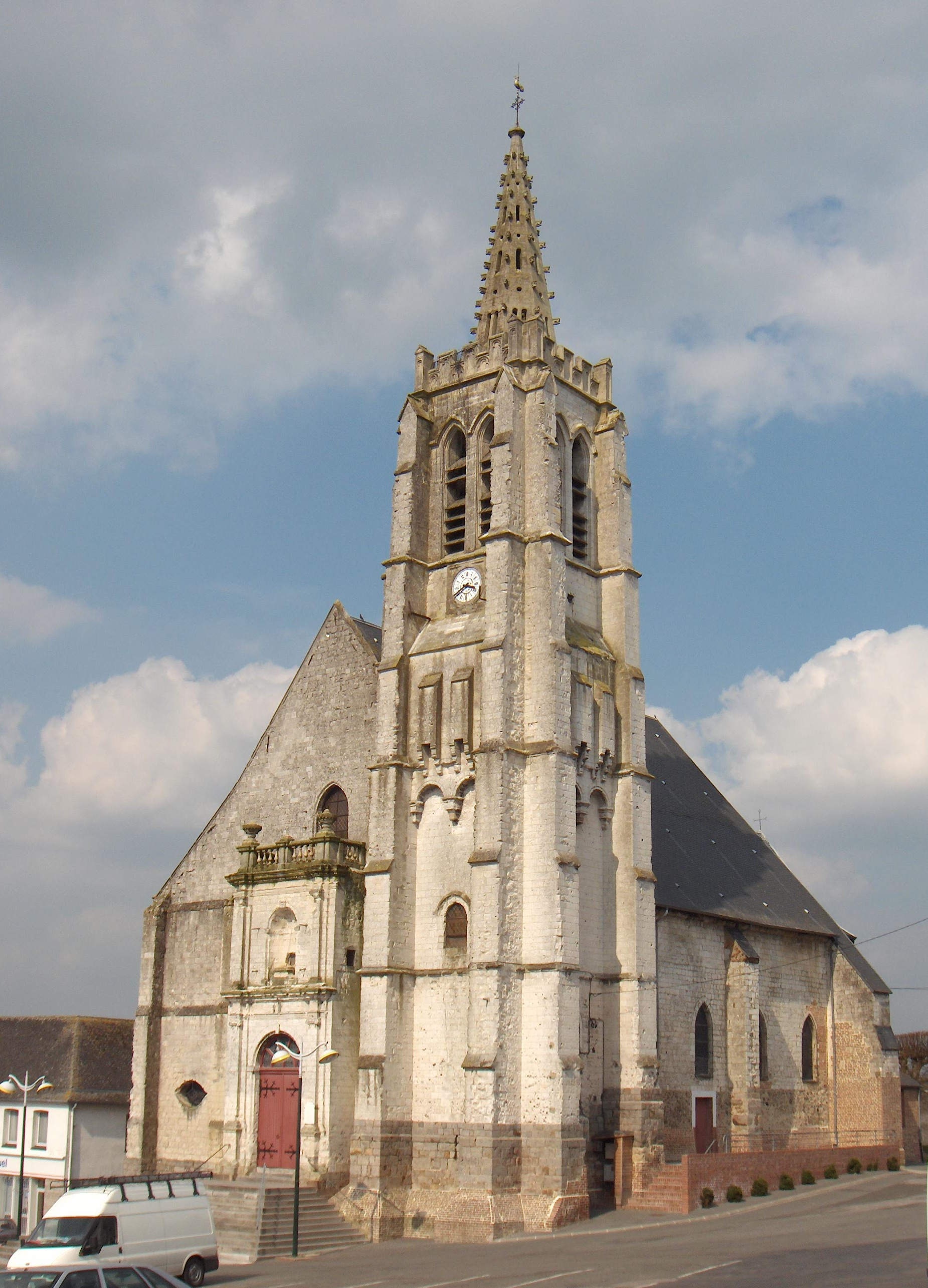 Fauquembergues (Frankreich, Dept. Pas-de-Calais), Stiftskirche Sankt Leodegarius (église collégiale Saint-Léger), 13. - 18. Jh., Spitze und Seitenschiffe des 19. Jh.s.